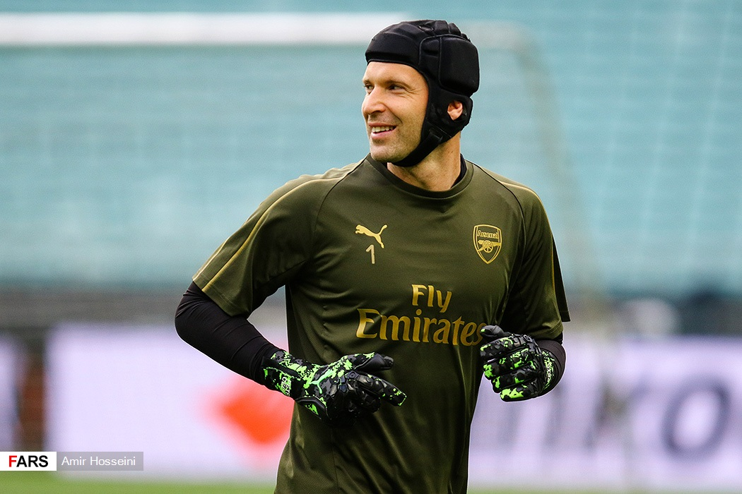 تمرین تیم فوتبال آرسنال پیش از فینال لیگ قهرمانان اروپا ۲۰۱۹